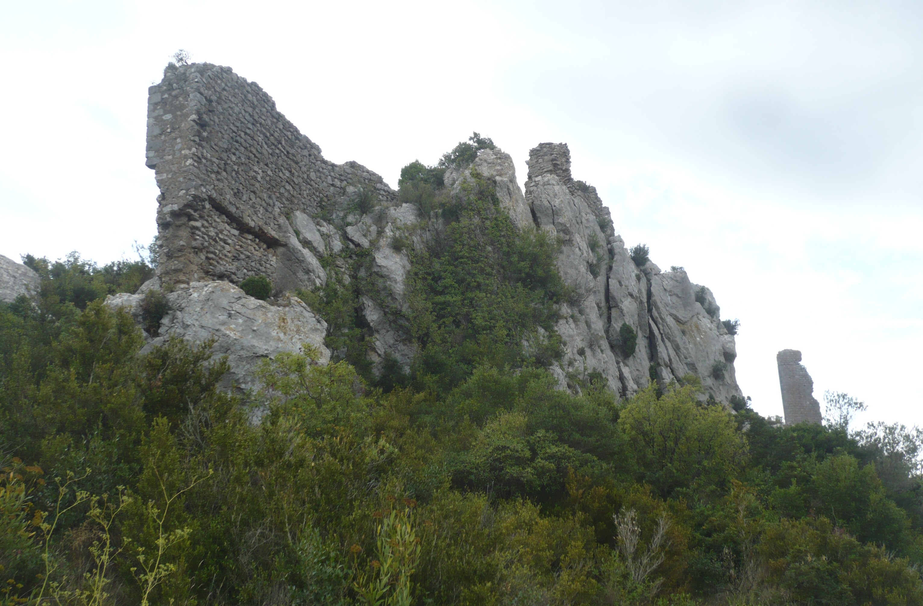 Vue d'ensemble du château de Tautavel .